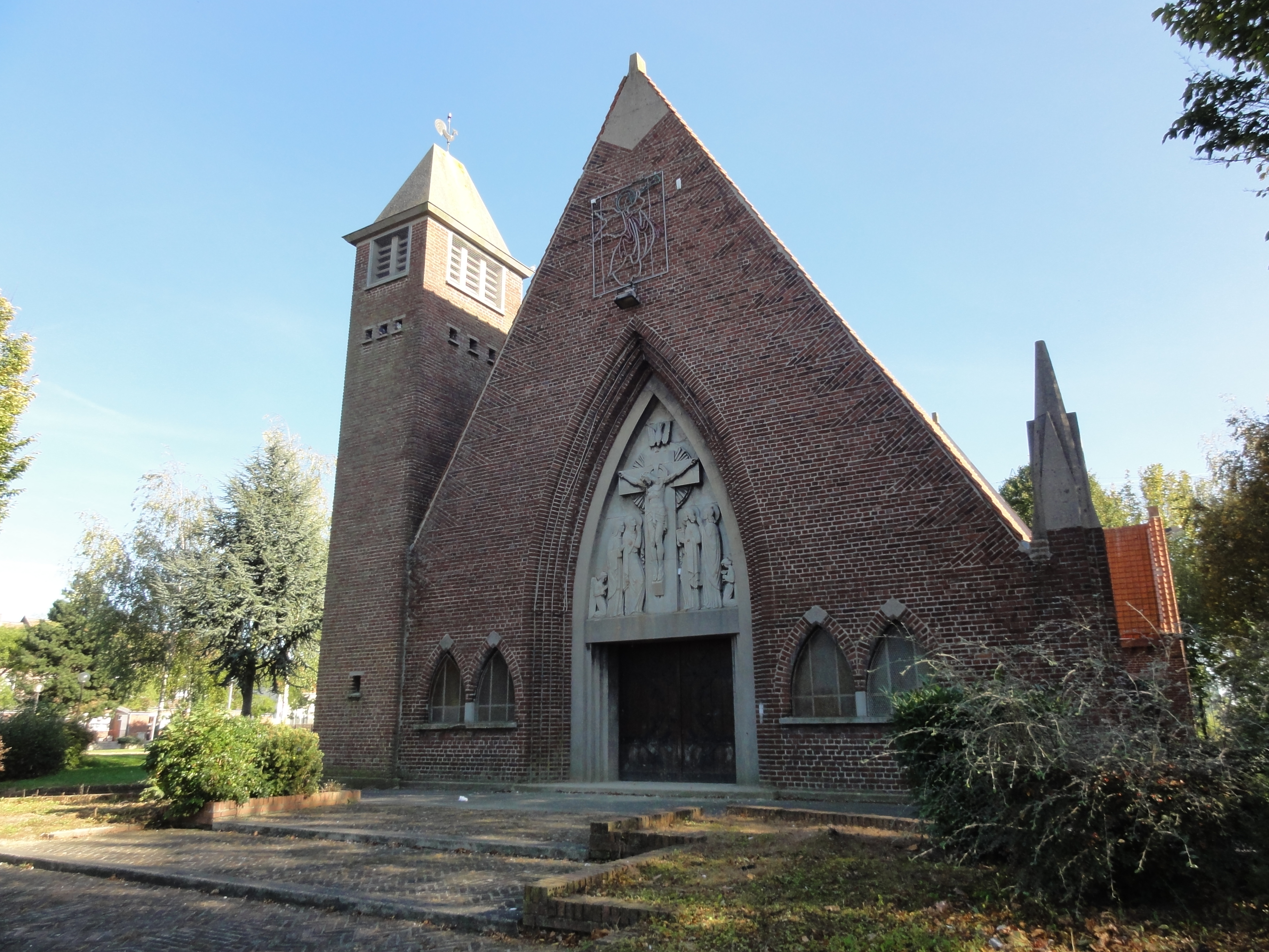 Église Sainte-Barbe des cités de la Fosse n° 1 de la Compagnie des mines de Drocourt, Drocourt, Pas-de-Calais, Nord-Pas-de-Calais, France.